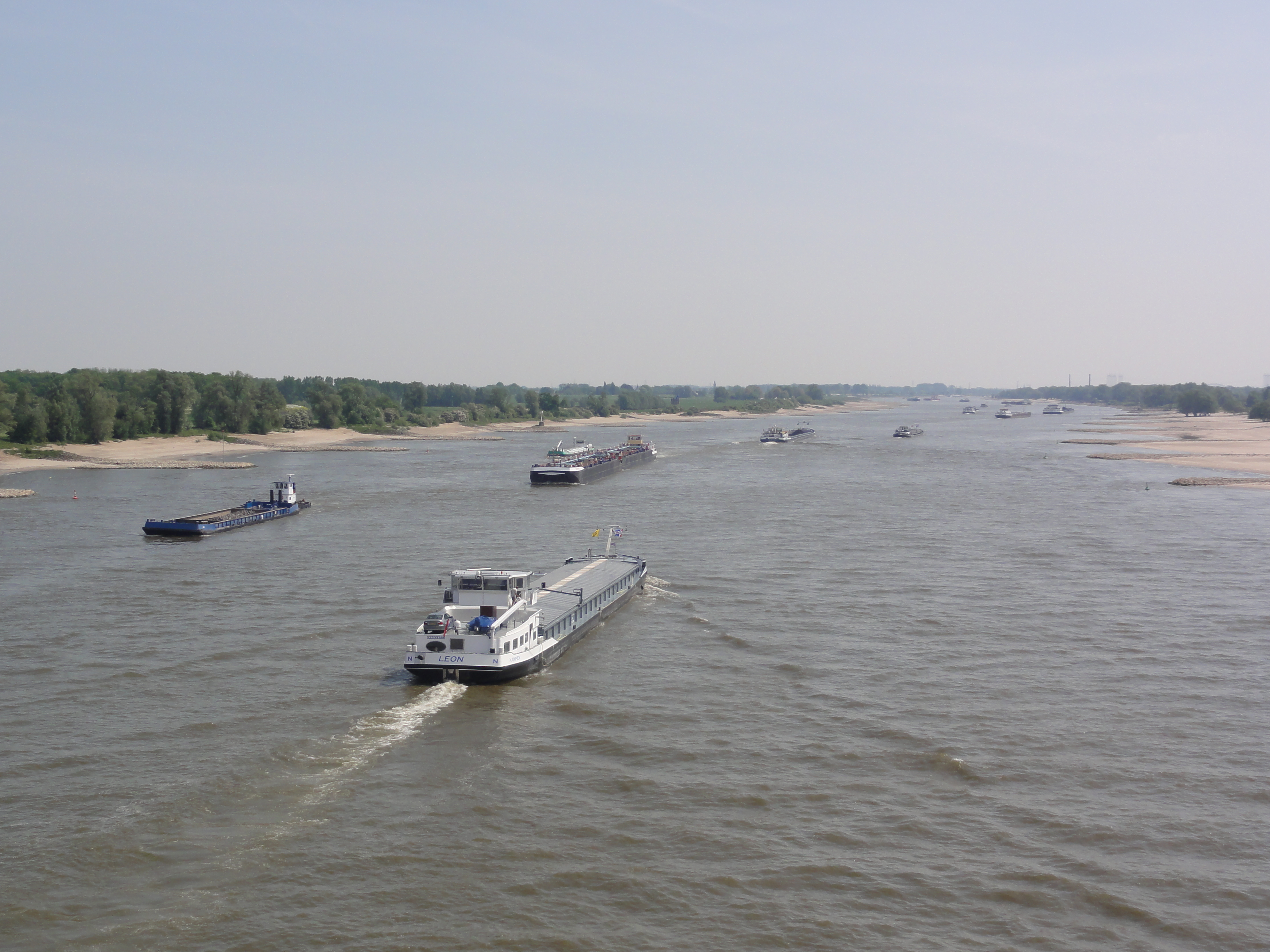 Ewijk (Beuningen) scheepvaart op de Waal (foto vanaf de Herman de Manbrug)